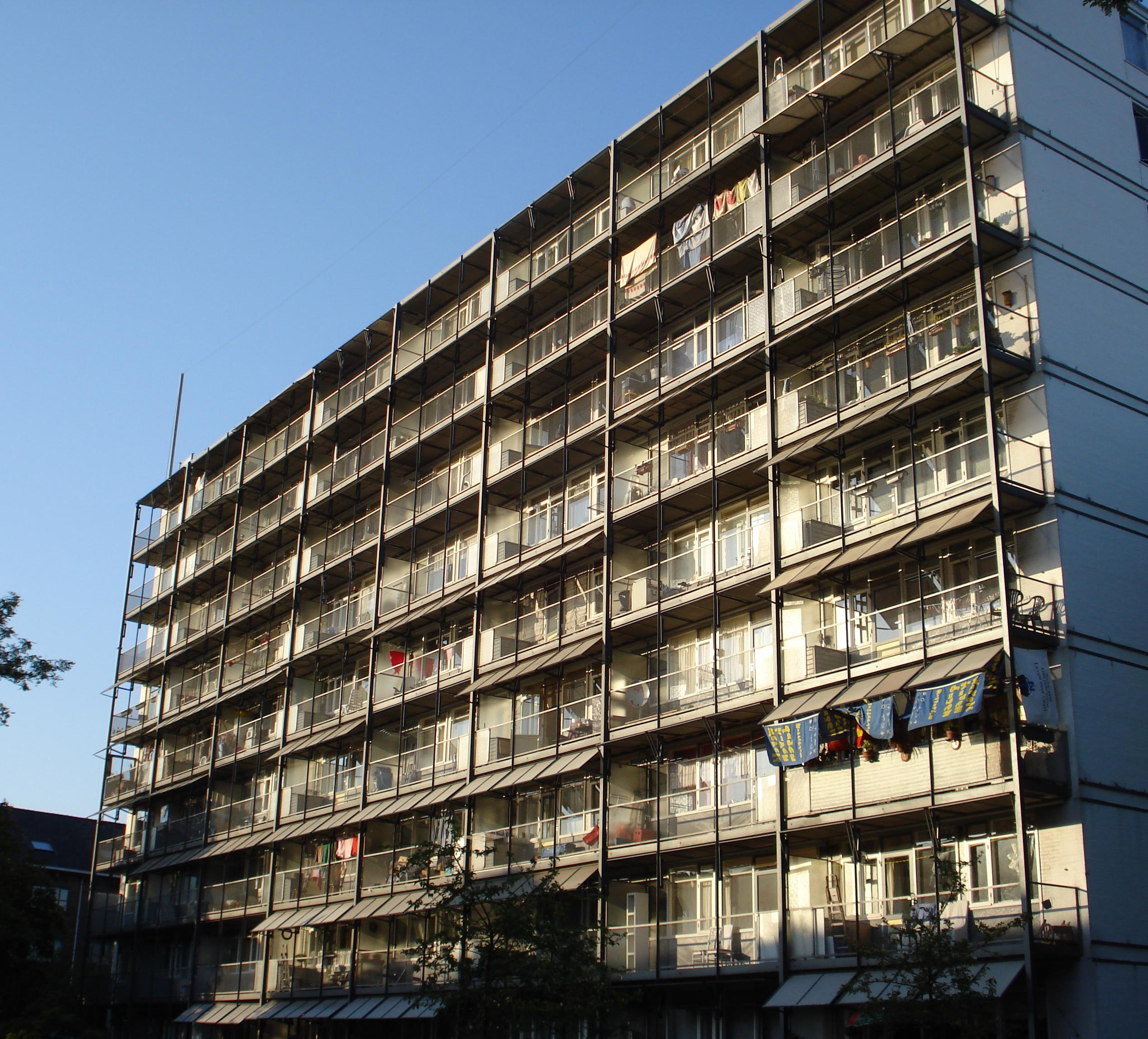 Rotterdam, Dr. de Visserstraat, Bergpolderflat. Rijksmonument.